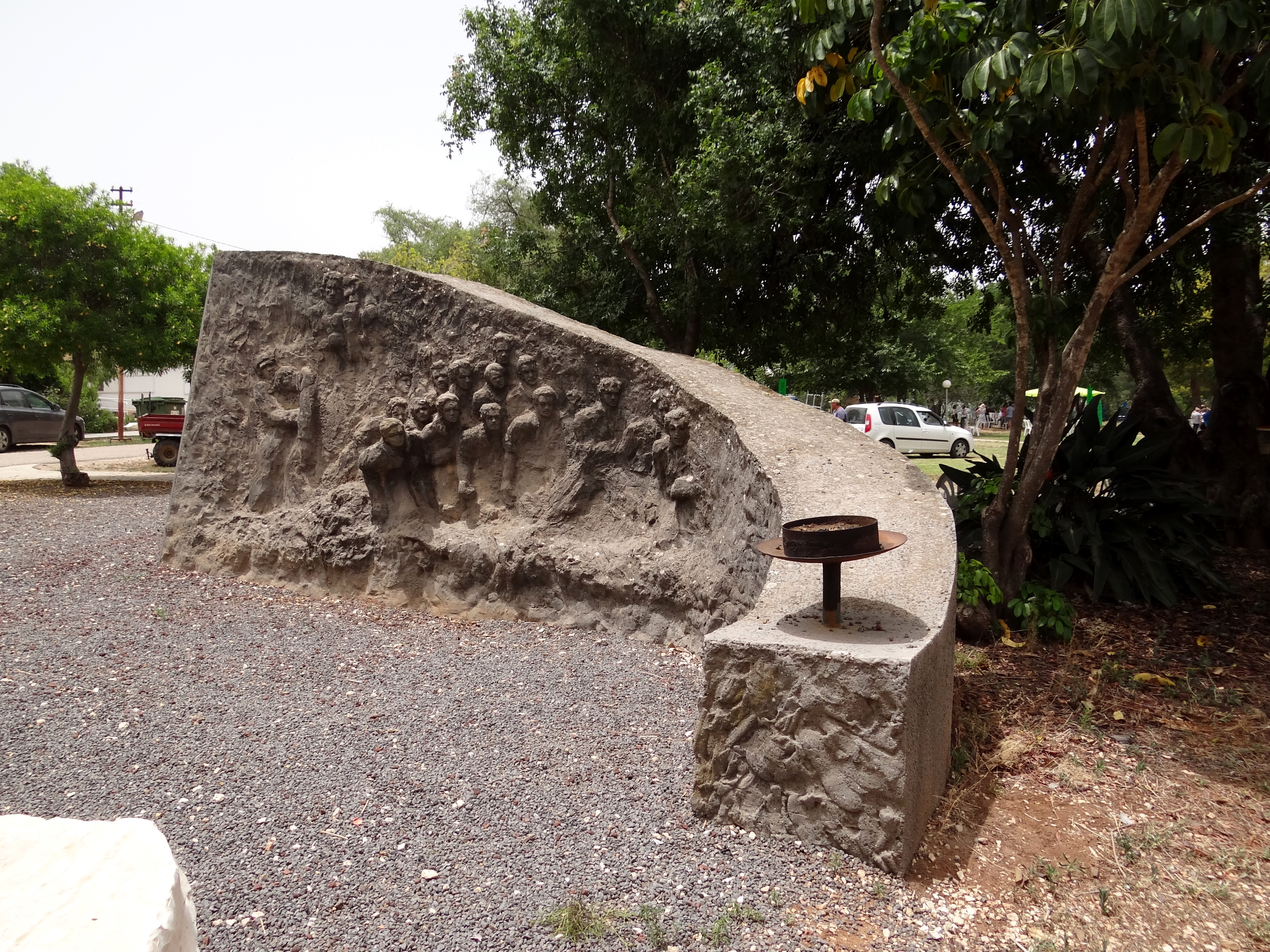 אנדרטה לנופלים בקיבוץ בית קשת,בקיבוץ בית קשת, הפסלת היא בתיה לישנסקי. אחיינה-עלי בן-צבי, נפל בקרב בבית קשת, האנדרטה שוכנת ליד חדר האוכל של הקיבוץ